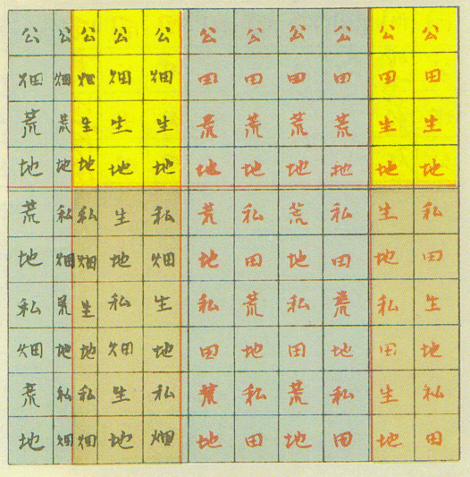 二宮尊徳が桜町領を調査した結果を1823年にまとめた土地利用状況の図。最も古い量率グラフの一つと思われる。出典：『二宮尊徳全集』第10巻、二宮尊徳偉業宣揚会、1928年1月20日発行、826頁。国立国会図書館蔵書。